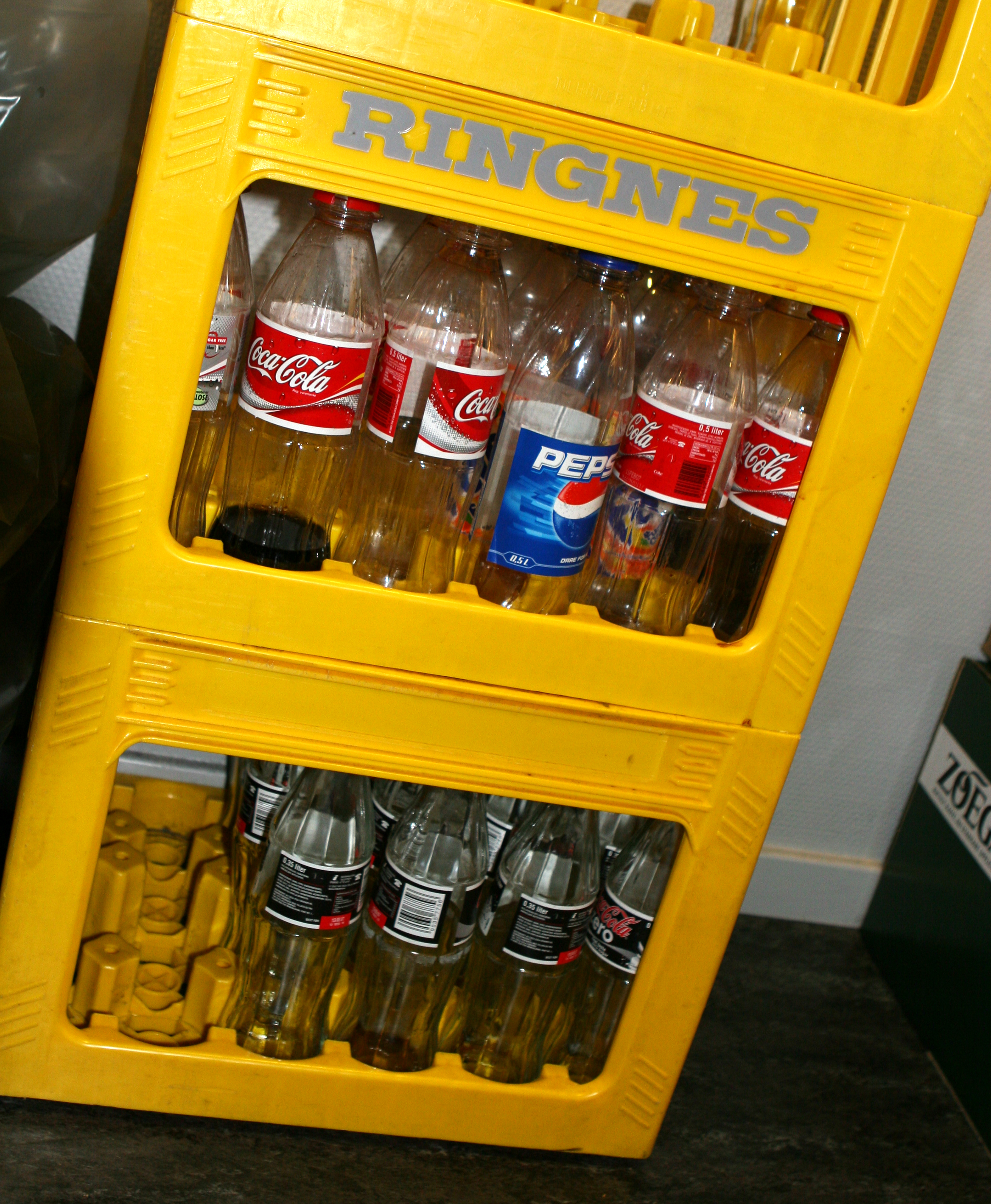 Norske bruskasser